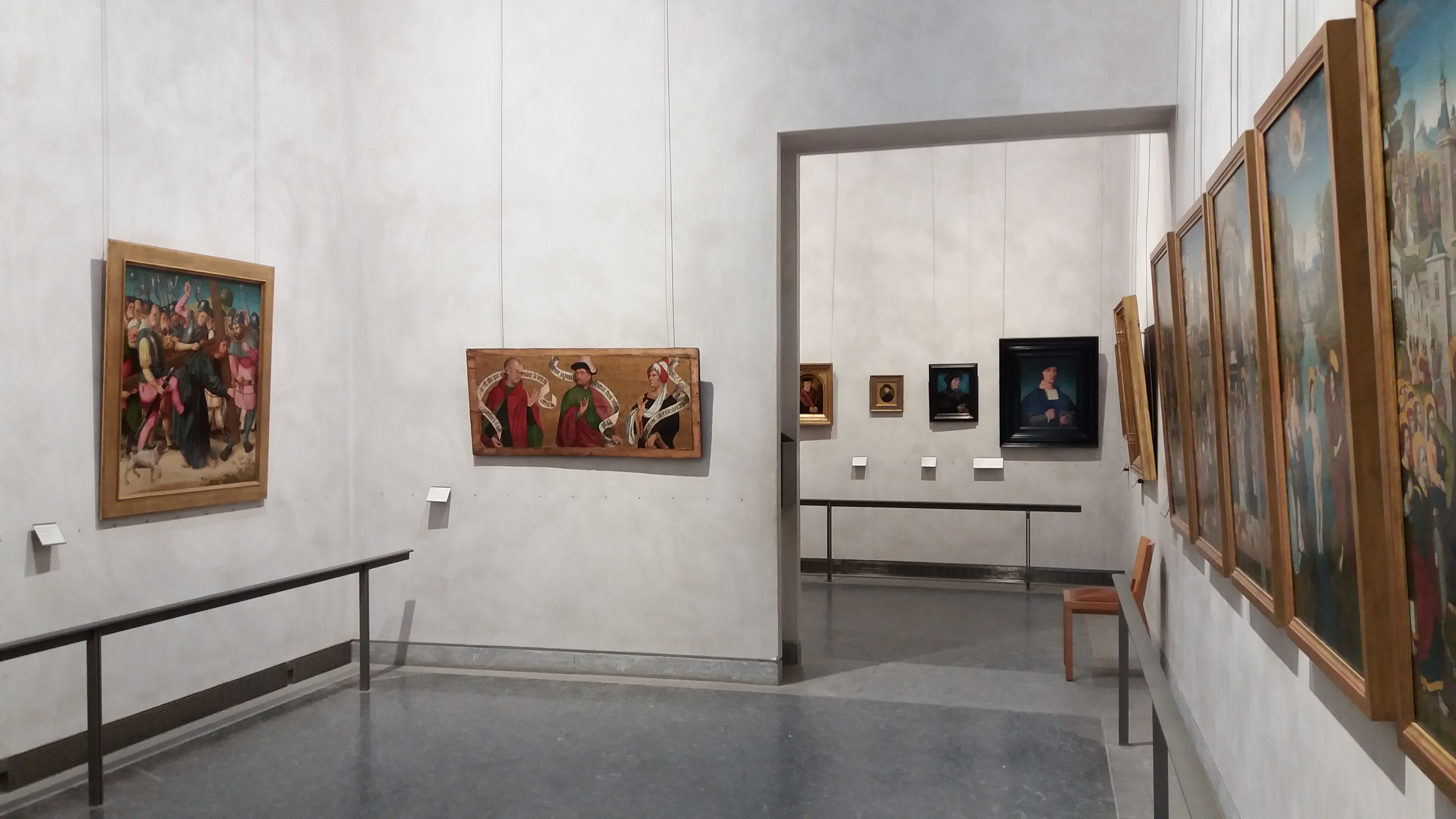 Salle 1, Espagne et Europe du nord, 1430-1530.